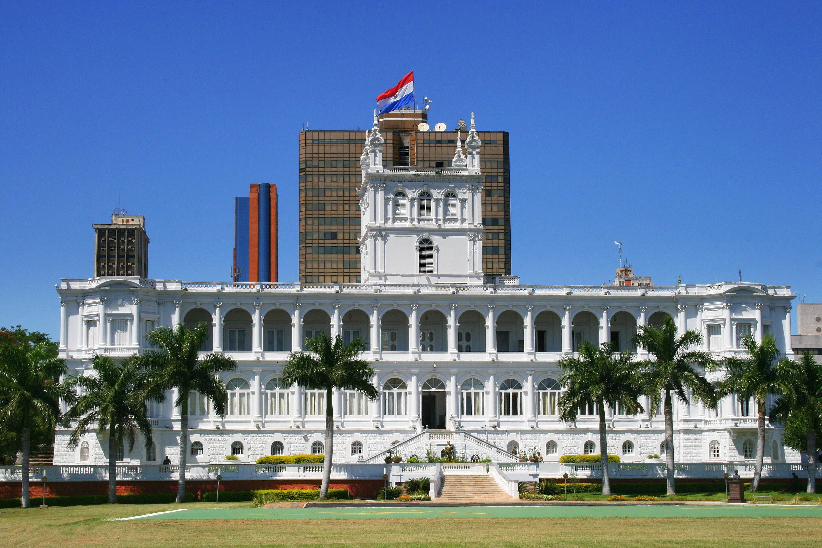 Palacio de los López en el centro histórico de Asunción del Paraguay.